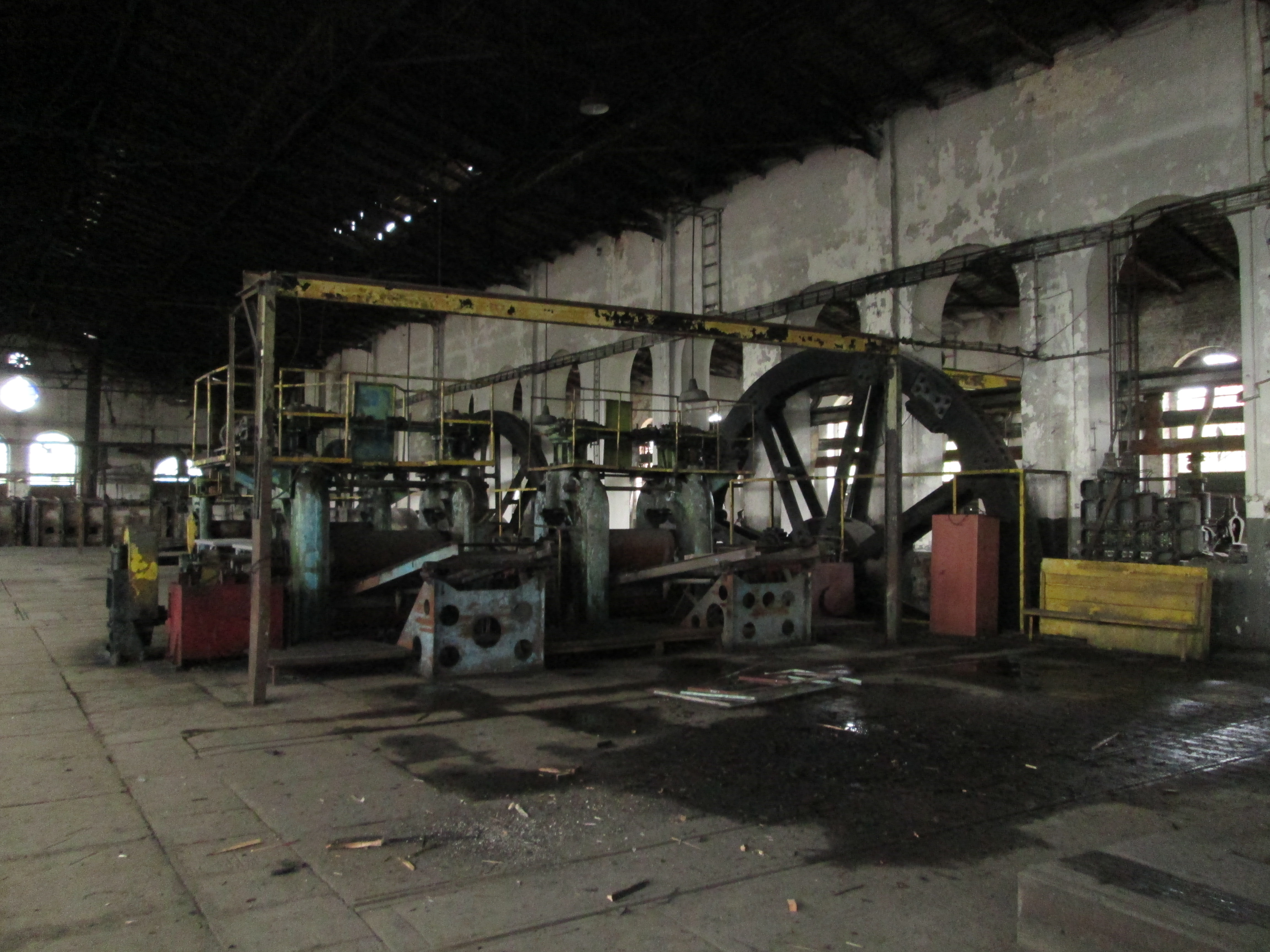 Katowice, walcownia, 1903-1904, 1915-1917